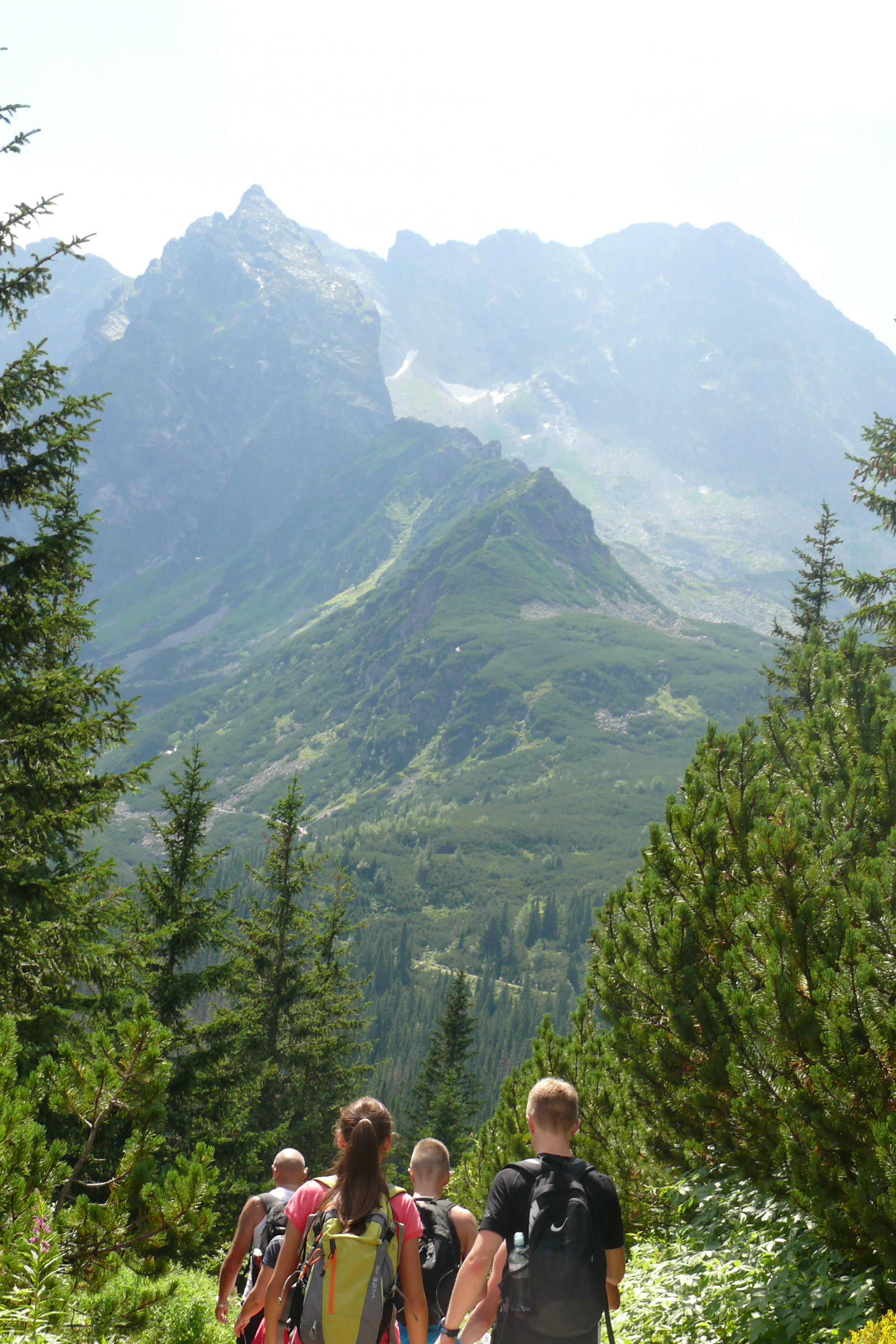 Specjalny obszar ochrony siedlisk Tatry. This is a photography of Natura 2000 protected area with ID PLC120001